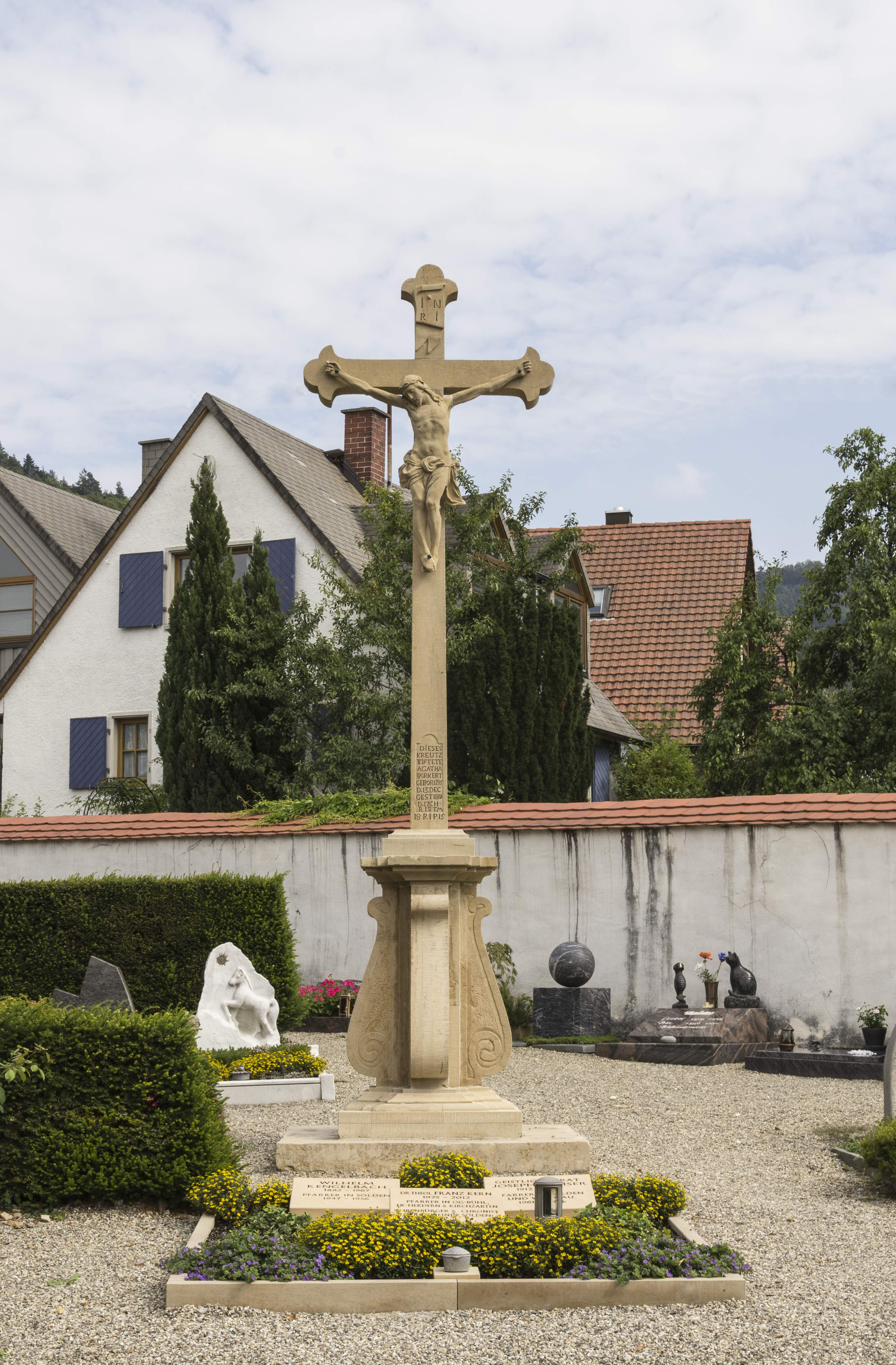 Katholische Pfarrkirche in Sölden bei Freiburg